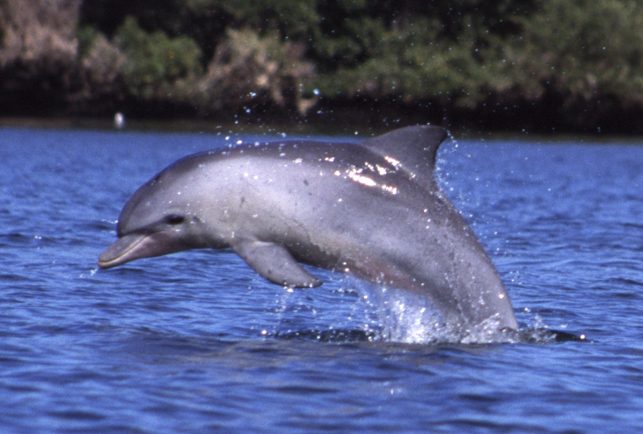 Grand dauphin de l'Océan Indien, Tursiops aduncus, dans la Port River, vers Adélaïde (Australie méridionale).